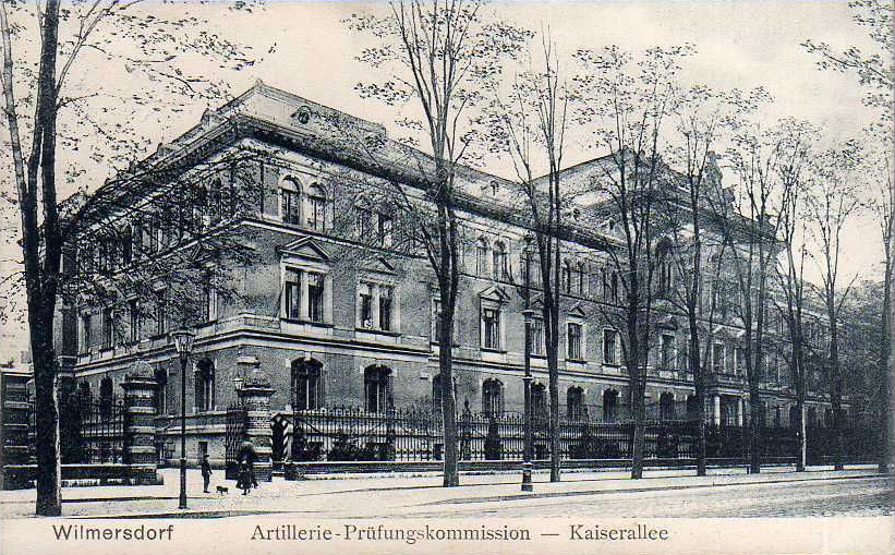 Verwaltungsgebäude der Artillerie-Prüfungskommission um 1909, Kaiserallee Berlin-Wilmersdorf